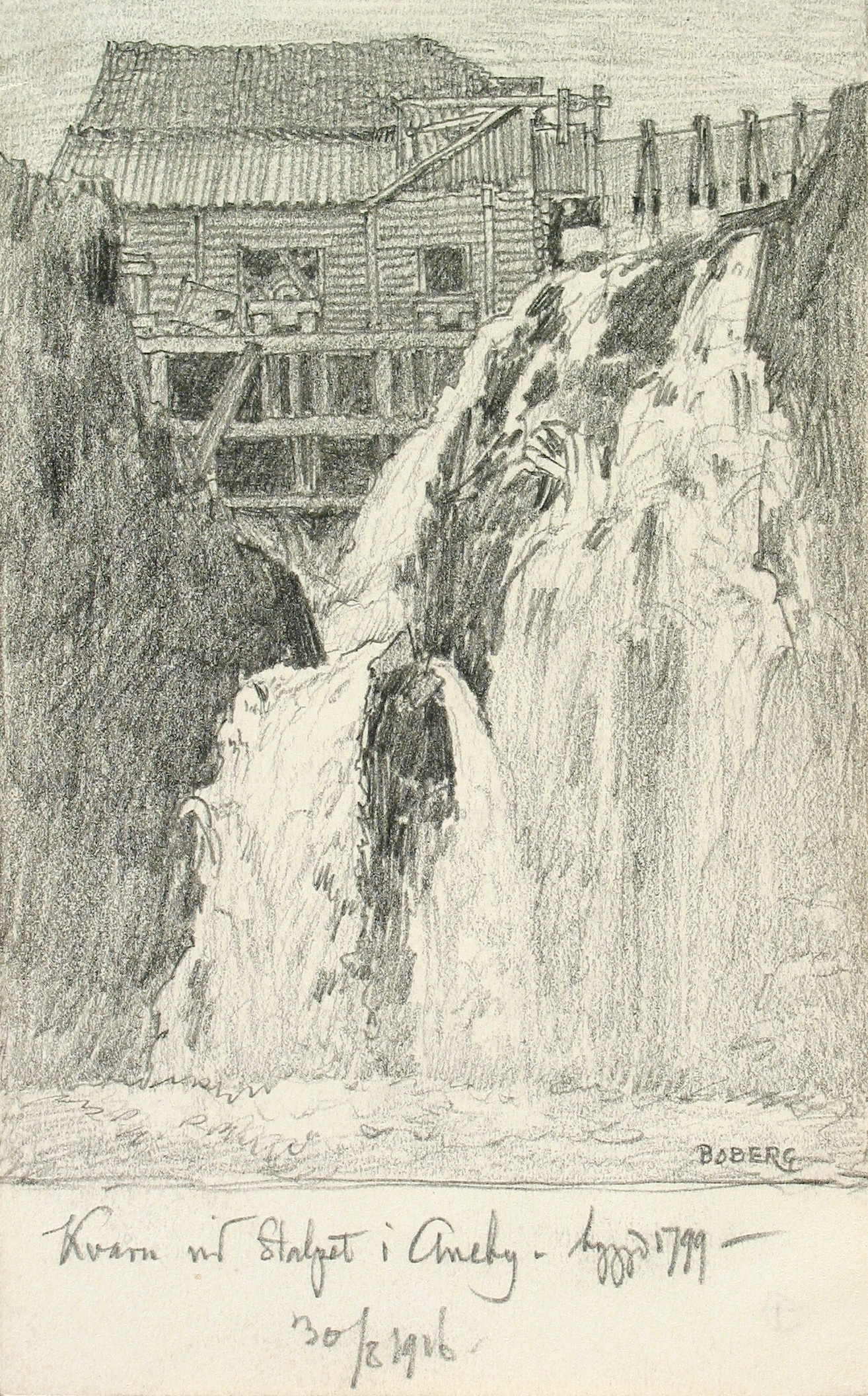 Småland, Vedbo hd., Marbäcks sn., Stalpet. "Kvarn vid Stalpet i Aneby – byggd 1799". Teckning av Ferdinand Boberg Depicted place: Q10713556 (Q10713556) (Härad), Stalpet (Ort), Q10576948 (Q10576948)